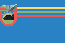 Прапор Антрацита